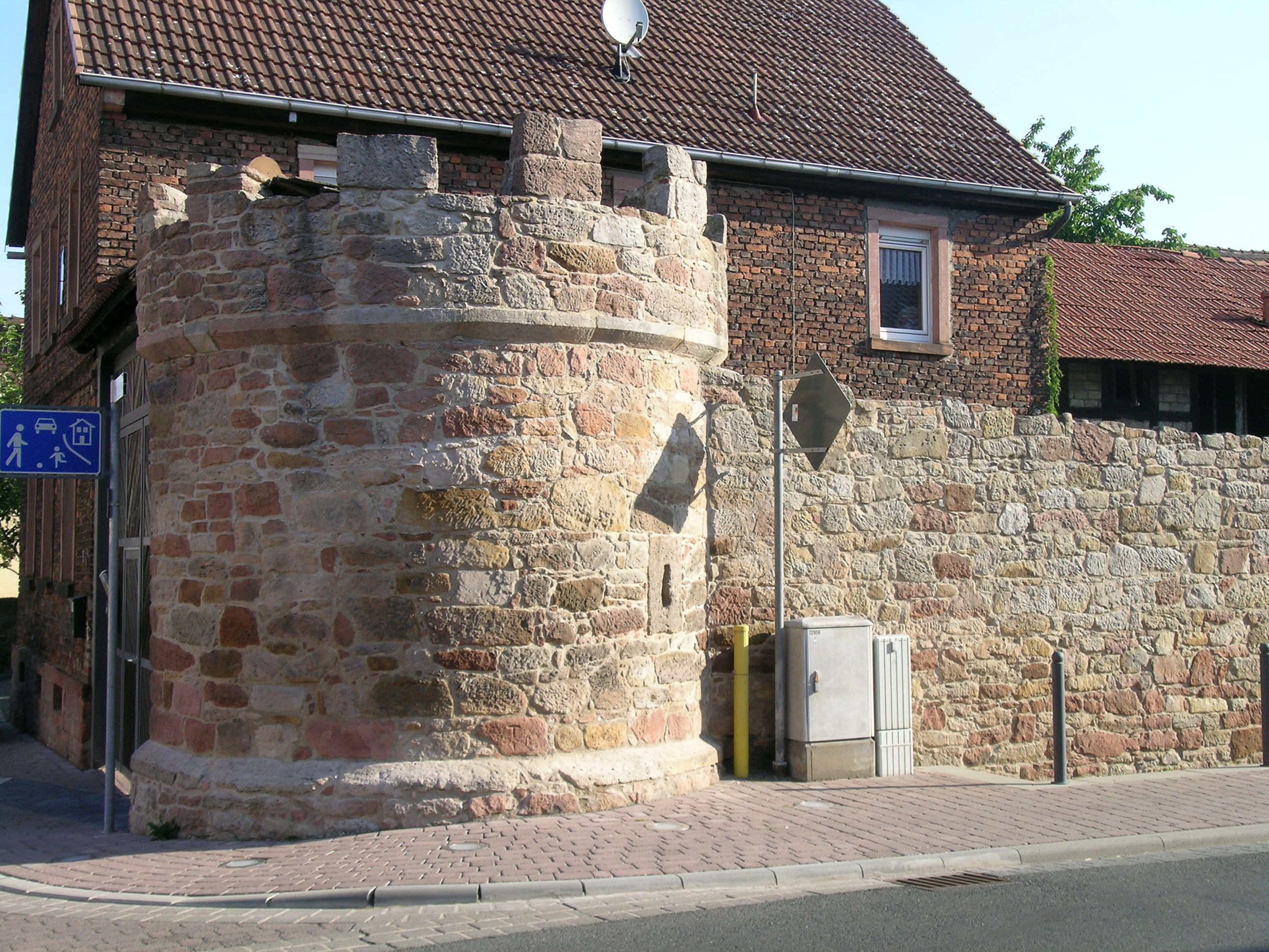 Zwei Rundtürme mit Zinnen, um 1500, Pfortengasse, Sulzbach am Main This is a photograph of an architectural monument.